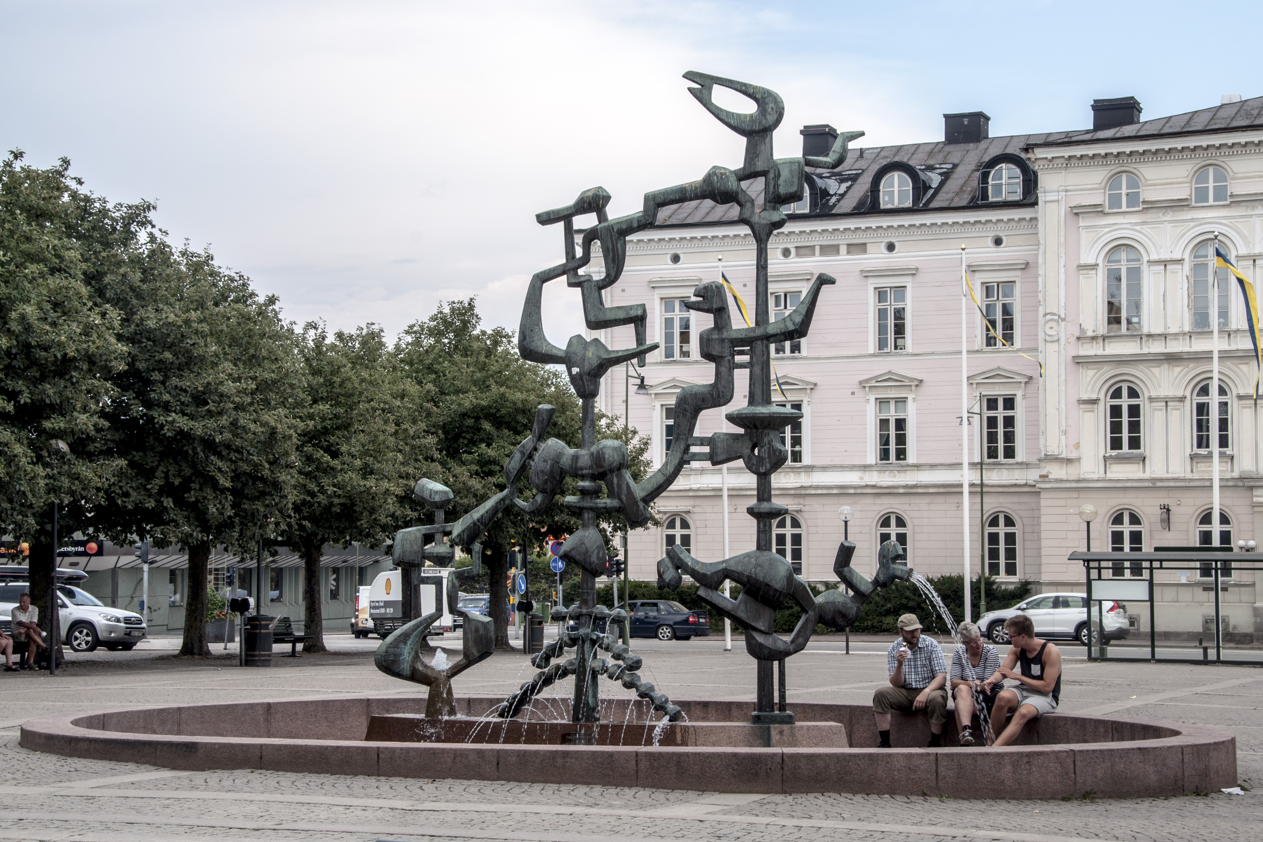 Per-Erik Willös skulptur Vänerskutan på Stora Torget i Mariestad. Invigd 1966